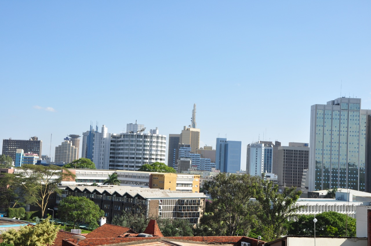 Taken from BBC studios